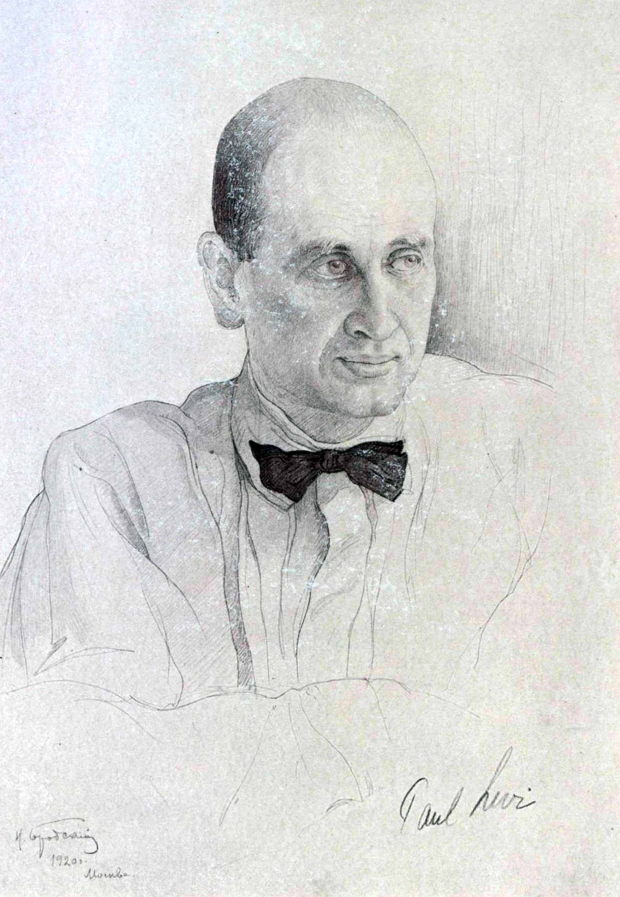 Леви, Пауль